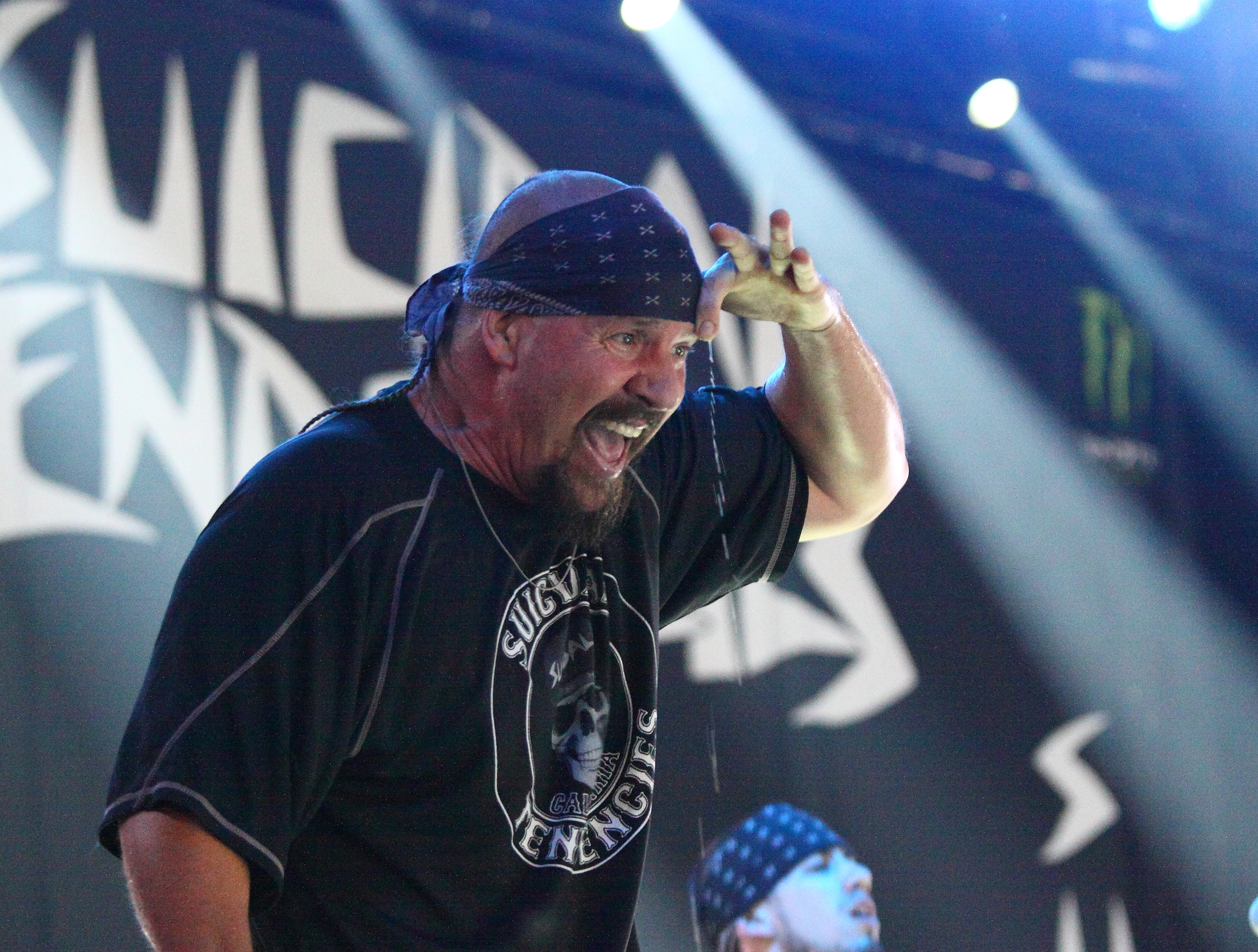 Suicidal Tendencies live at Roskilde Festival 2013 (by Morten Mensen)